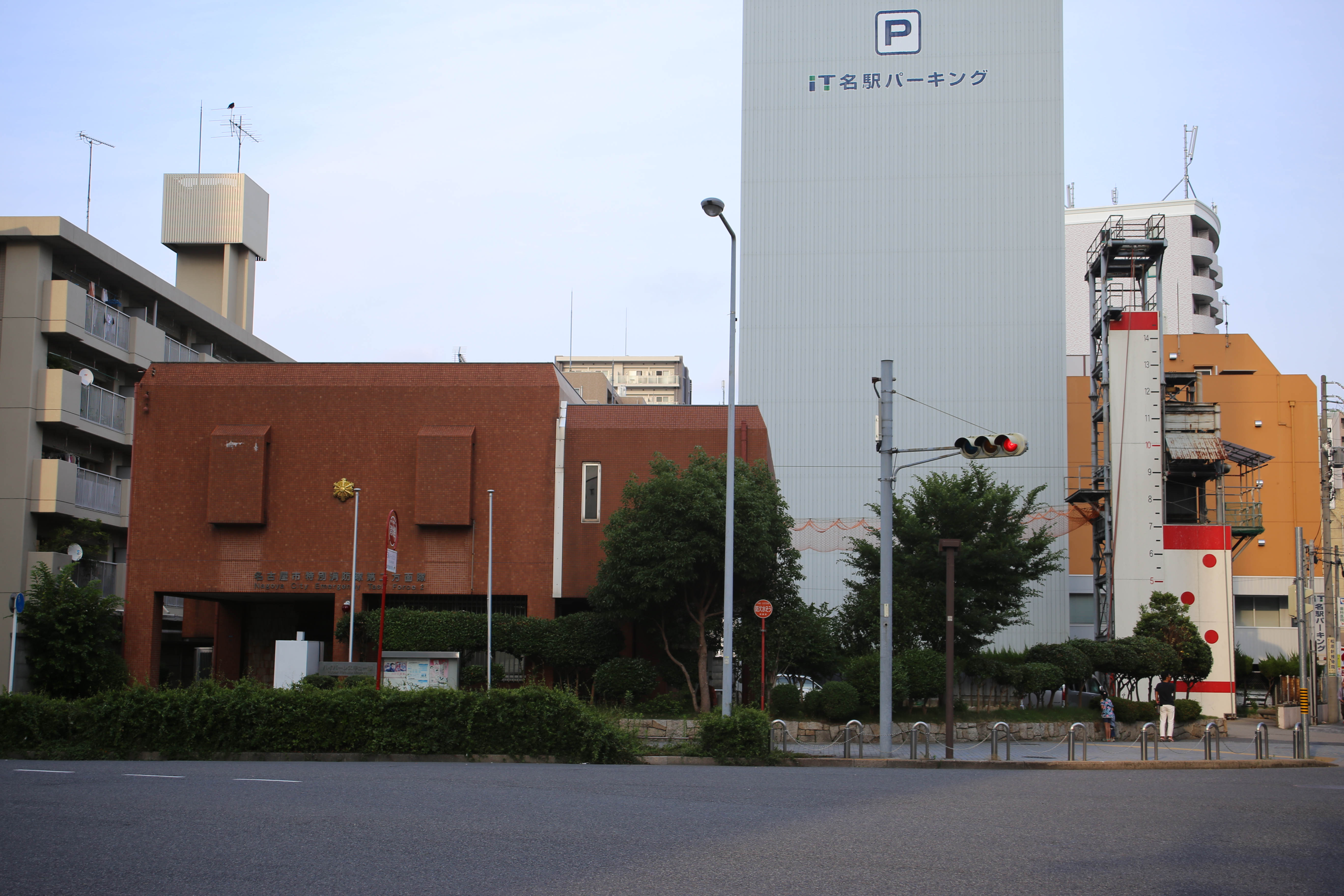 名古屋市西区那古野の名古屋市消防局特別消防隊第二方面隊を西側公道より撮影